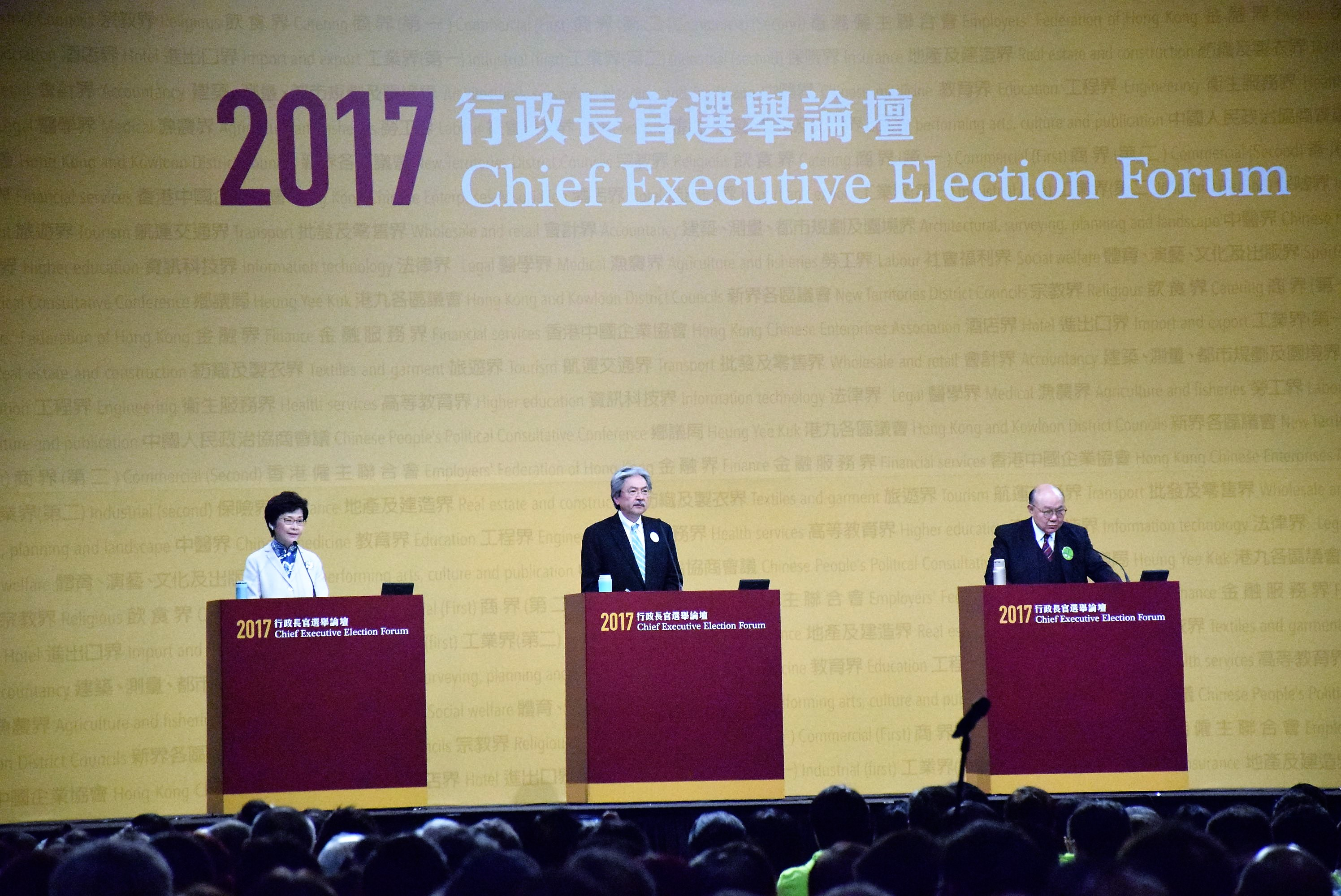 中文（香港）: 香港特首選舉候選人林鄭月娥(左起)、曾俊華及胡國興出席選舉論壇(VOA湯惠芸攝)